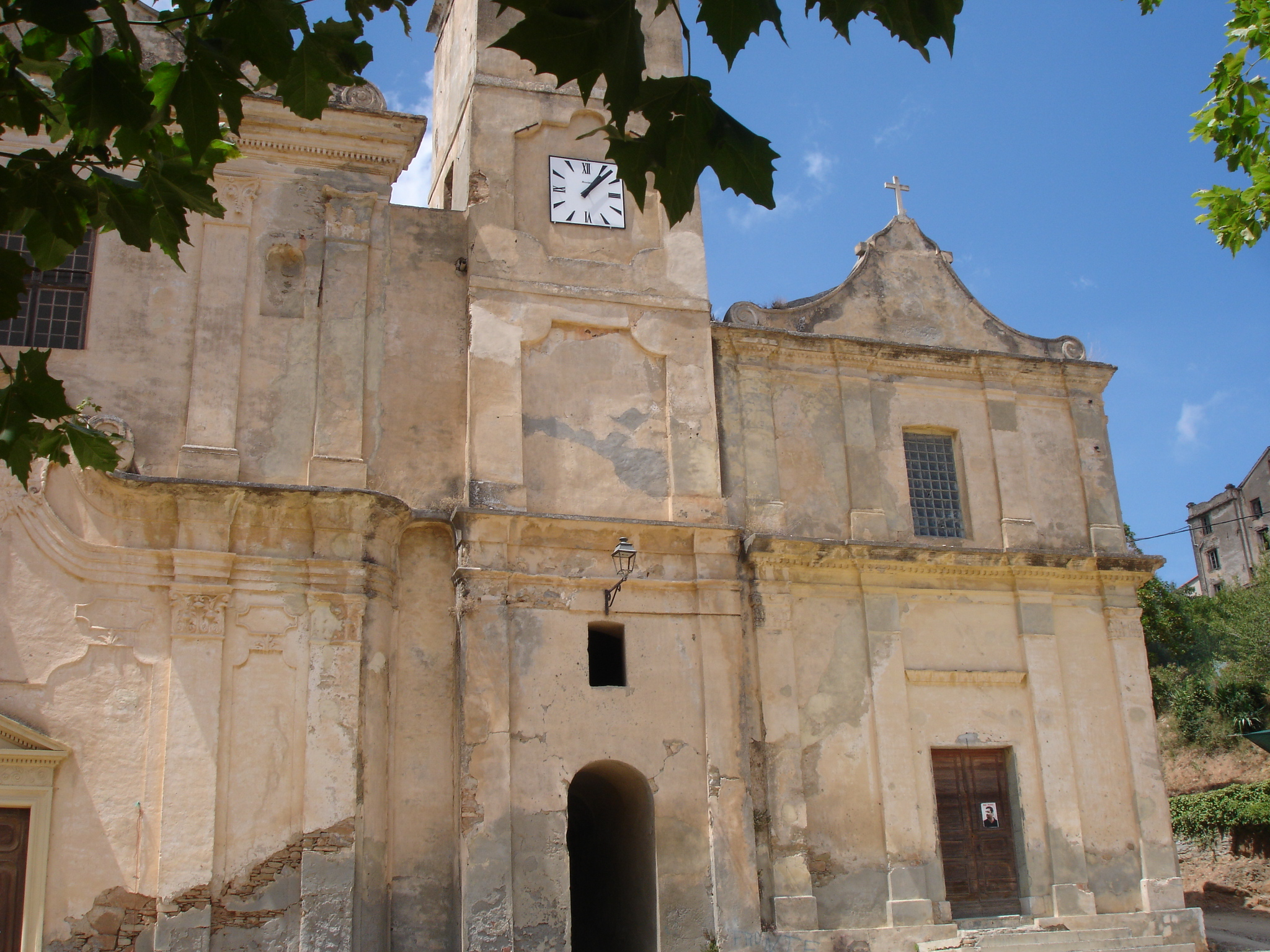 France, Haute-Corse (2B), Santo-Pietro-di-Tenda, église